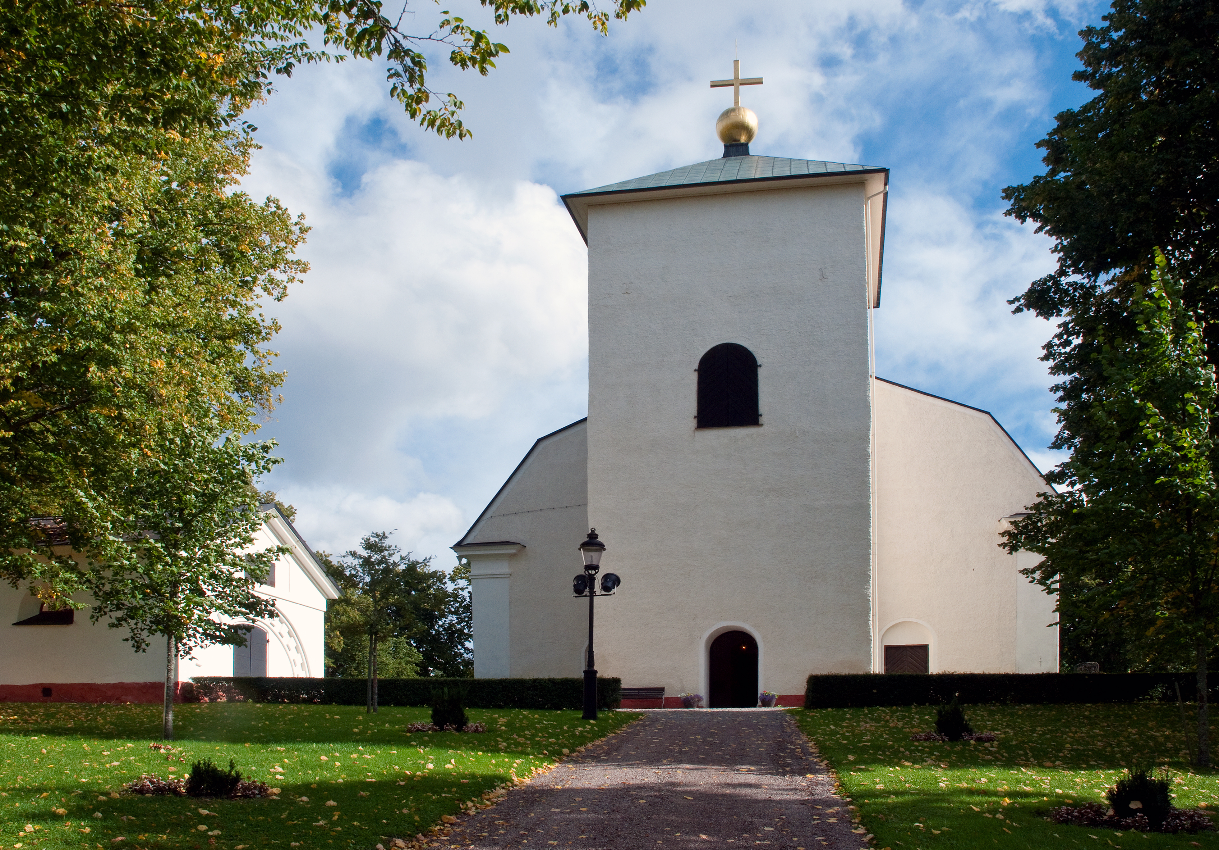 Svärta kyrka i Nyköpings kommun